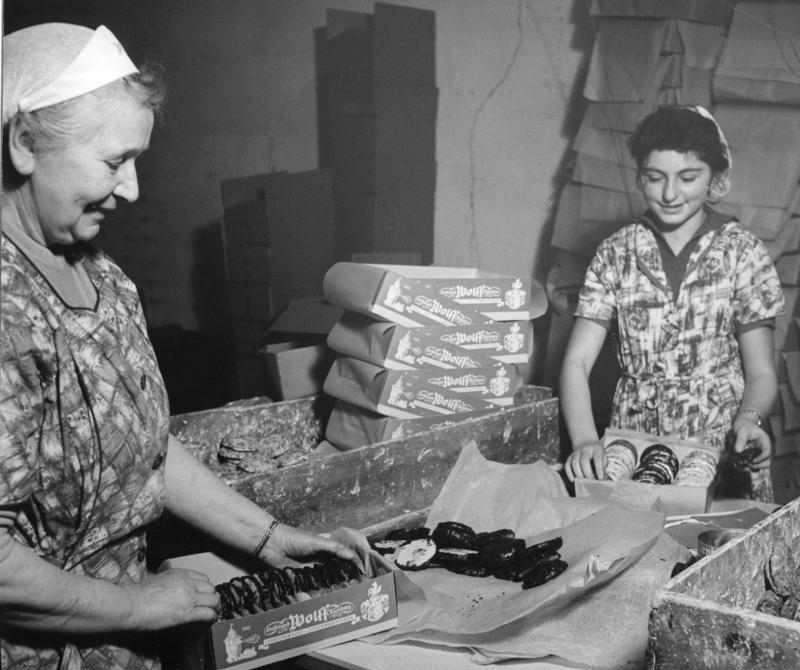 Ferdinand Wolff, Nürnberger Lebkuchenfabrik Verpackung von runden Nürnberger Lebkuchen in Kartons.